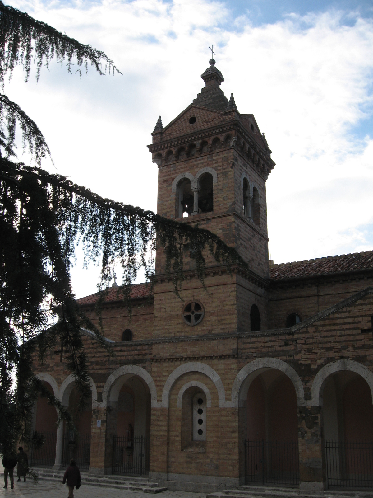 Chiesa di San Costanzo a Perugia - Fiancata con campanile